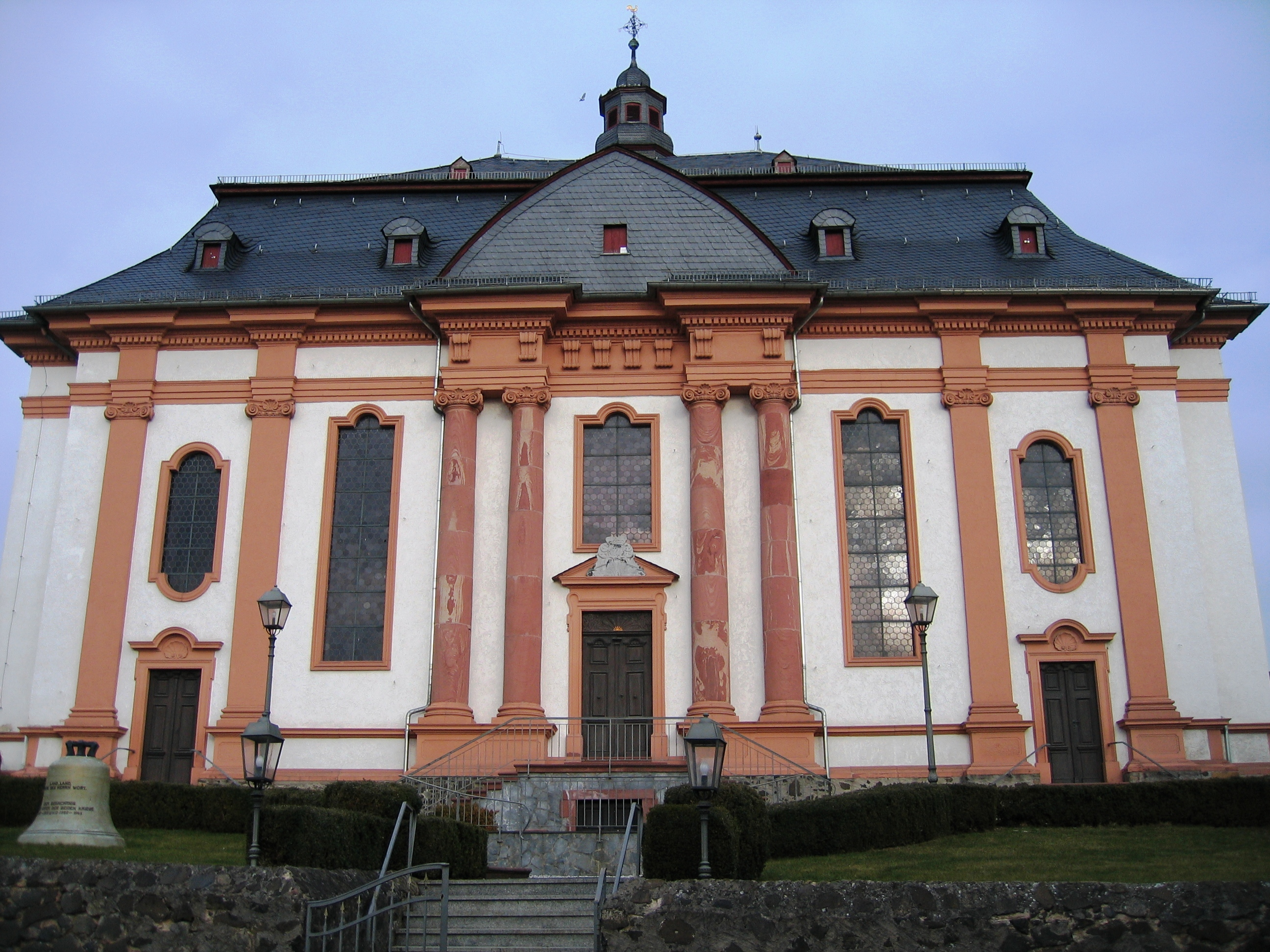 Südfassade (Vorderseite) der Evangelisch-reformierten Kirche in Wölfersheim